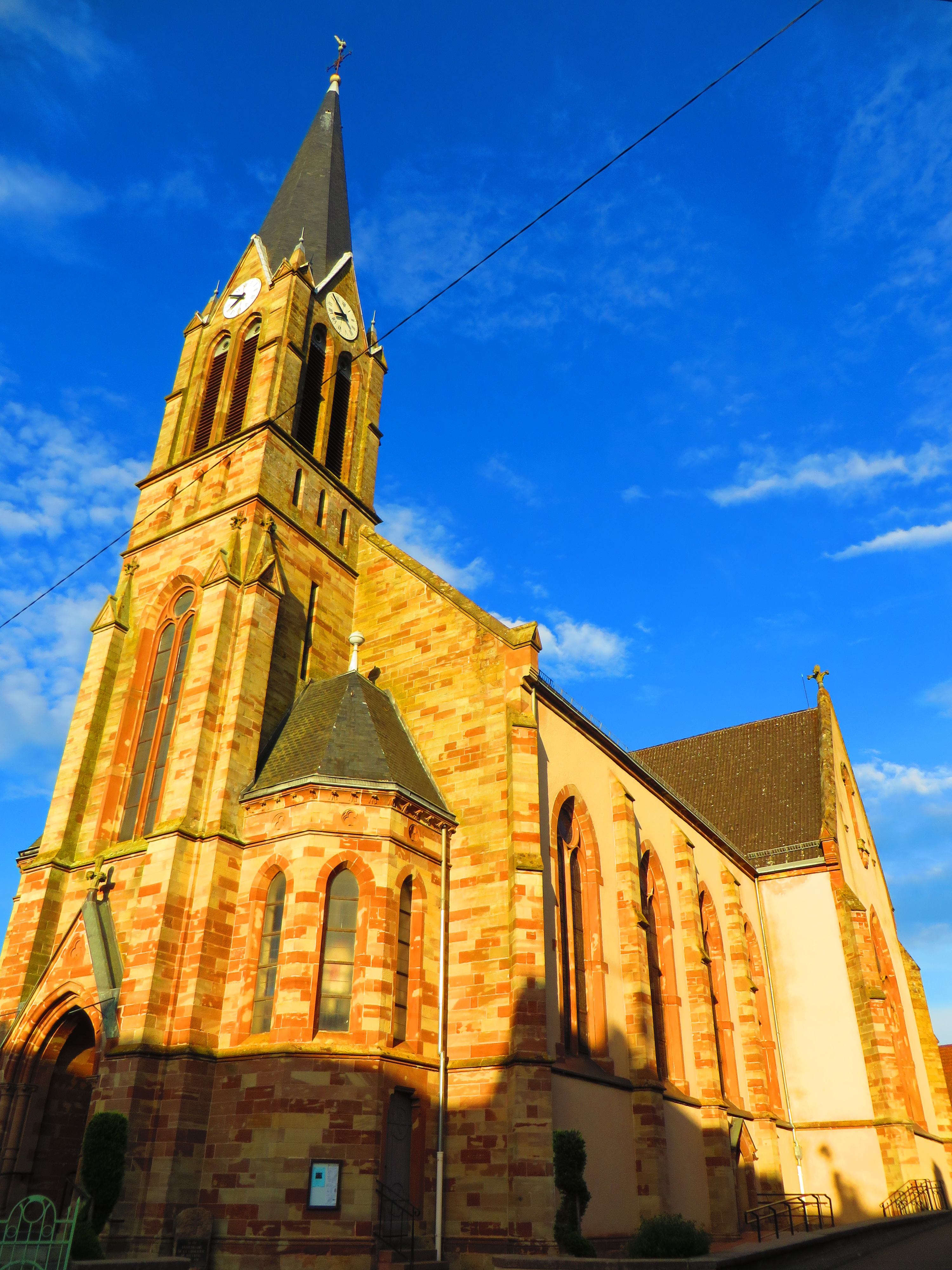 Wittring Église Saint-Étienne